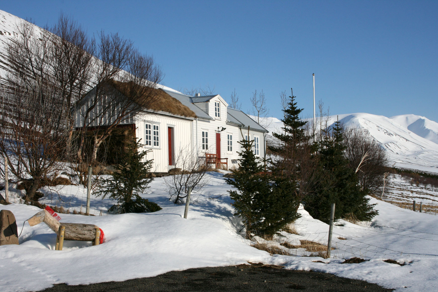 Gullbringa í Svarfaðardal